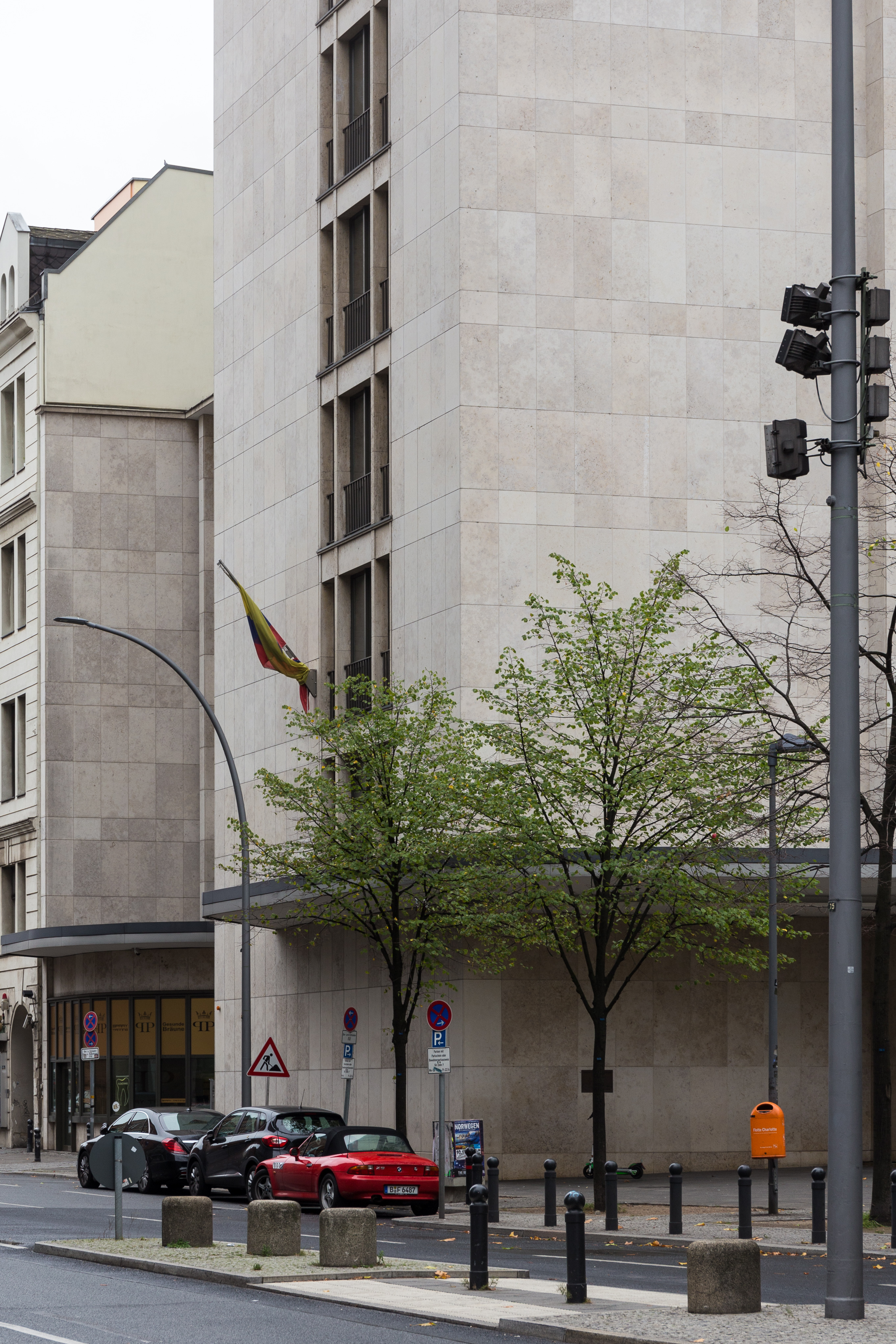 Ambassade d'Équateur à Berlin, Joachimsthaler Straße 10-12.